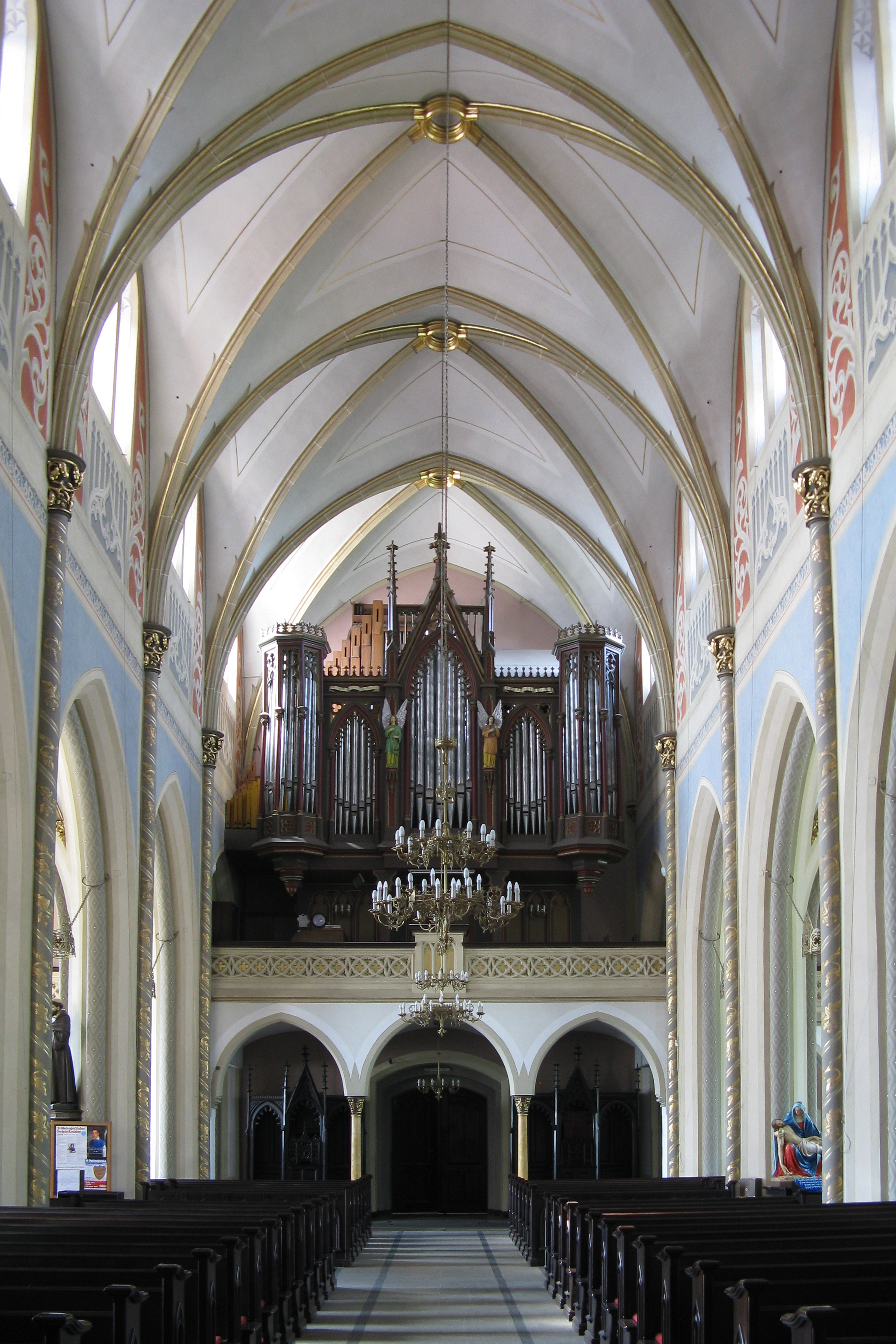 nawa główna kościoła św. Wojciecha, widok na emporę i organy z około 1875 roku wykonane przez Volkmanna z Gliwic